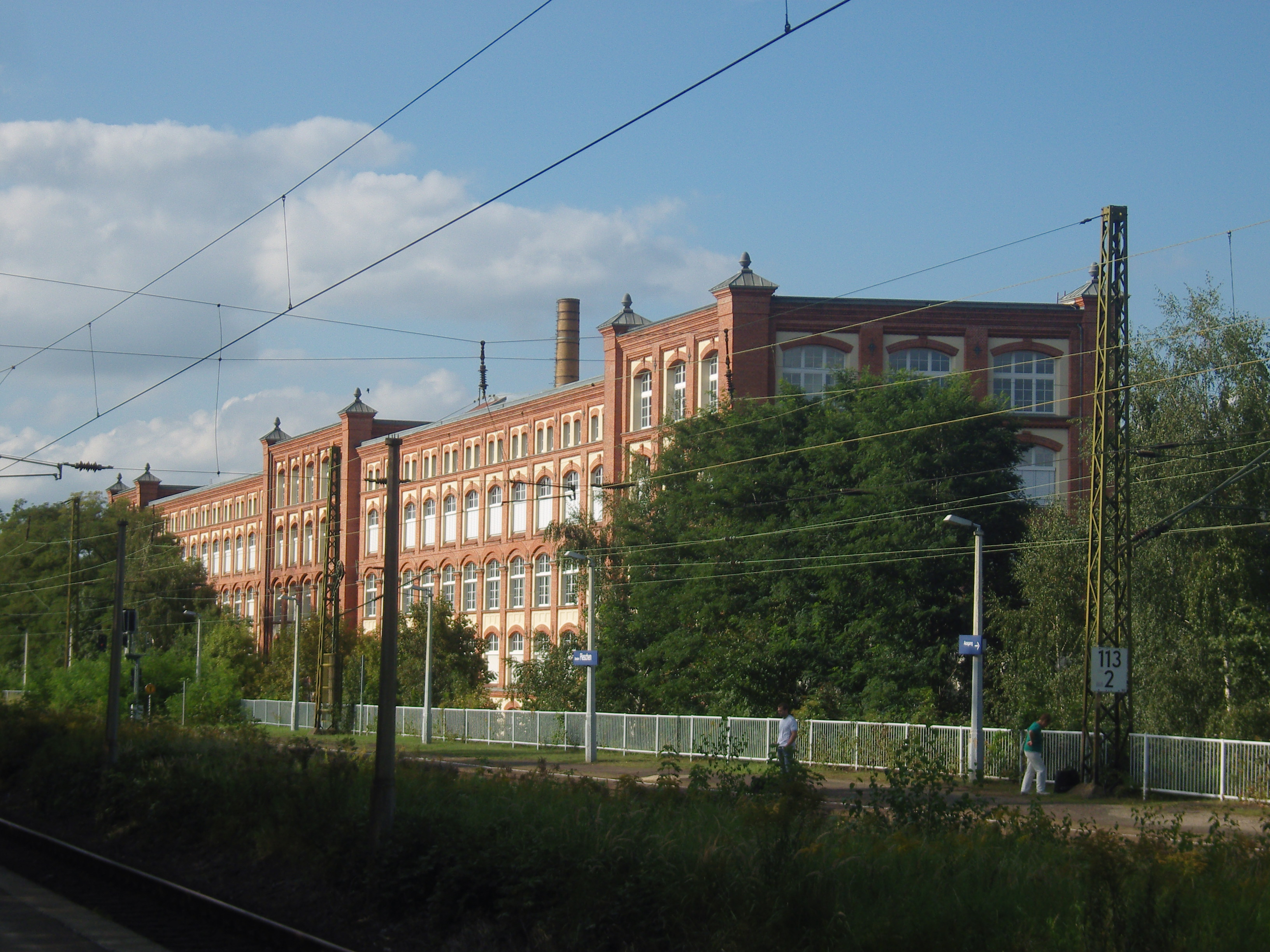 Eschebach-Werke von Haltepunkt Pieschen aus aufgenommen